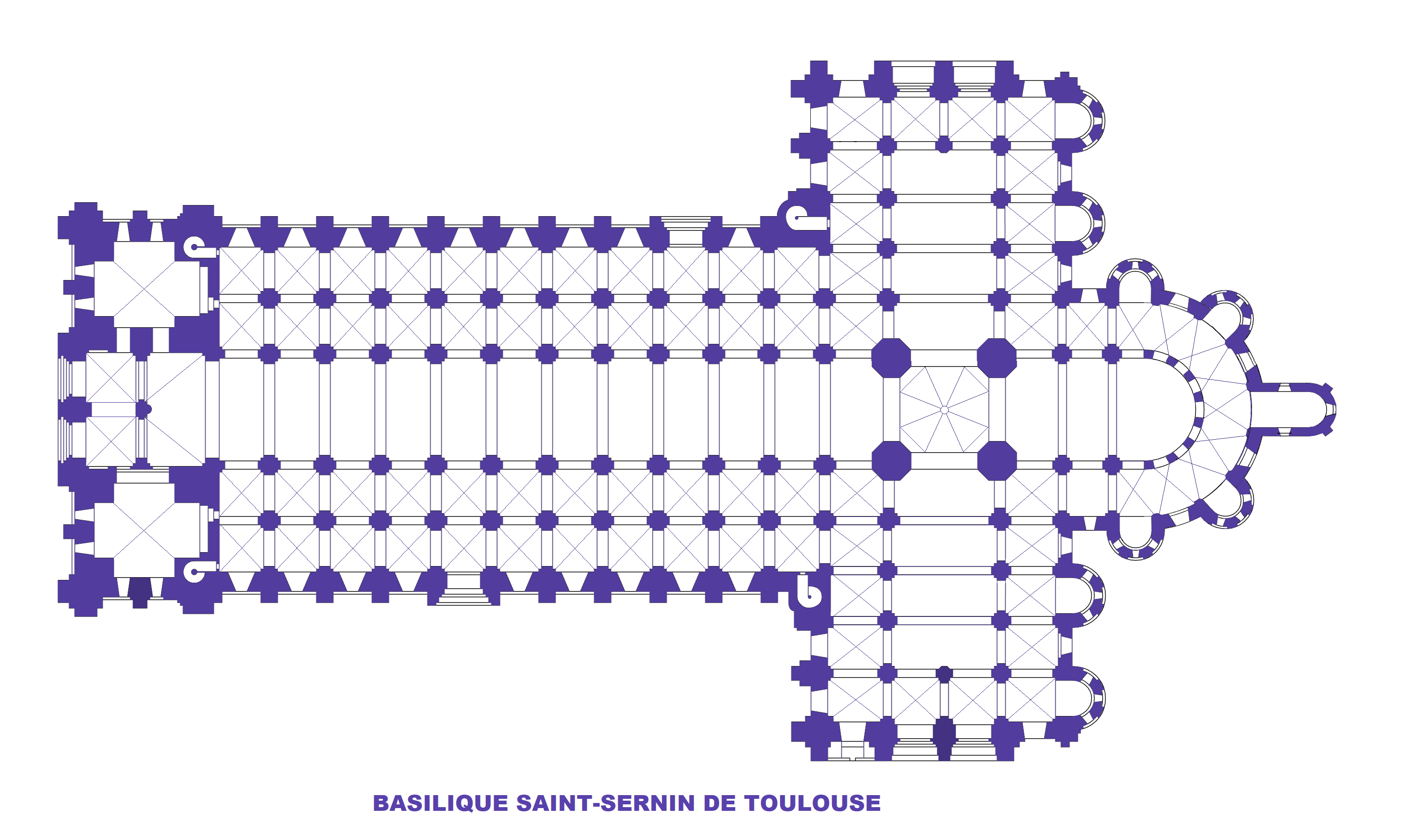 Basilique SAint-Sernin de Toulouse, Plan (image Commons modifiée)